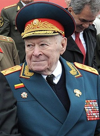 Генерал армии Бобков Ф.Д. на военном параде на Красной площади в ознаменование 67-й годовщины Победы в Великой Отечественной войне.